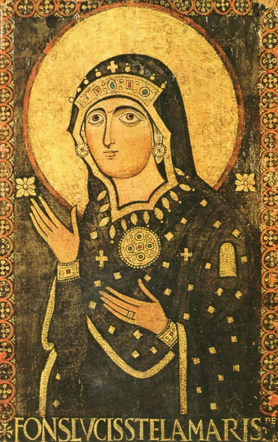 Petrus pictor= Hagiosoritissa (Madonna Avvocata)